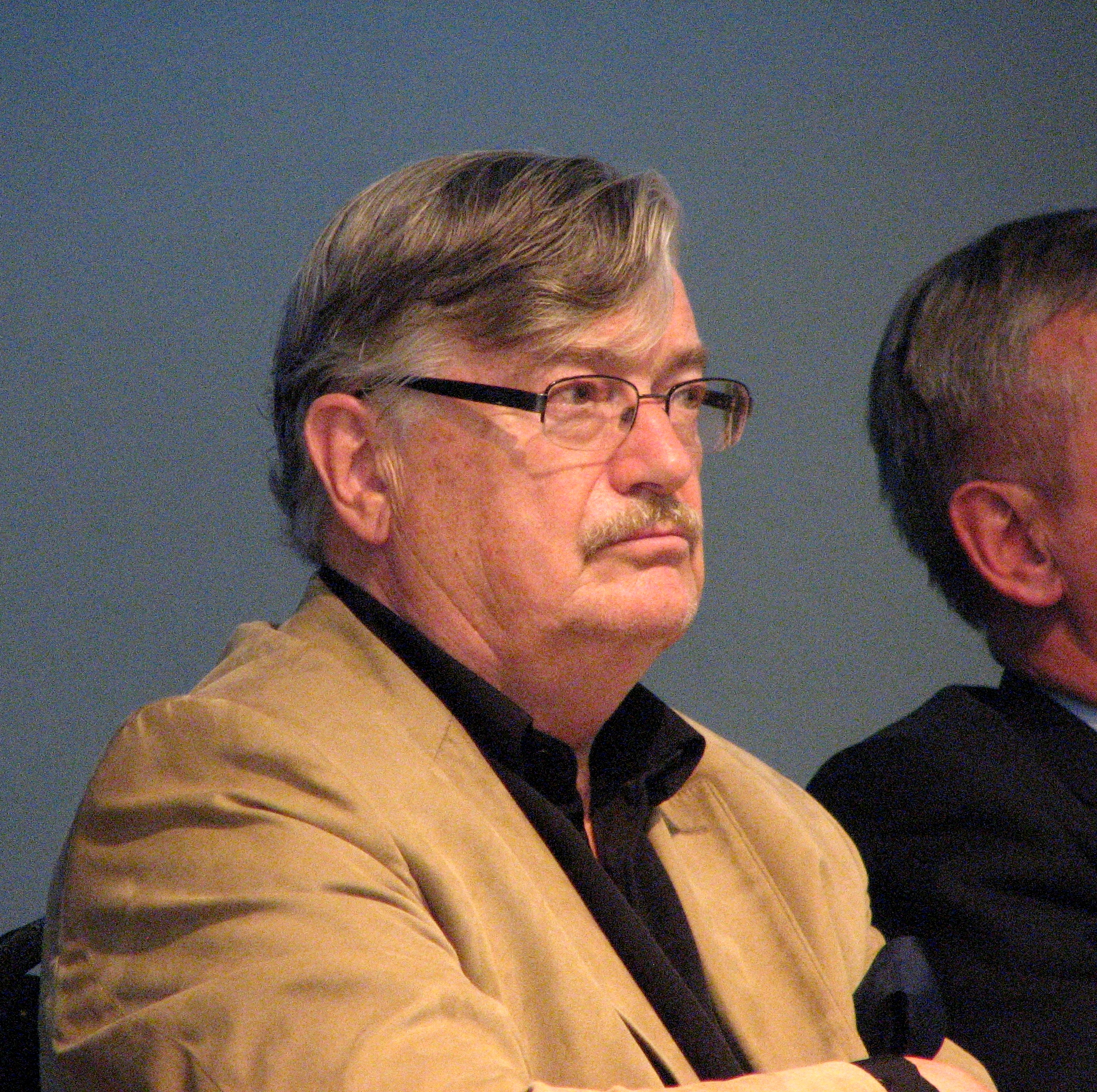 Jarmo Virmavirta esinemas V Läänemere ajaloopäeval Kuressaare kultuurikeskuses